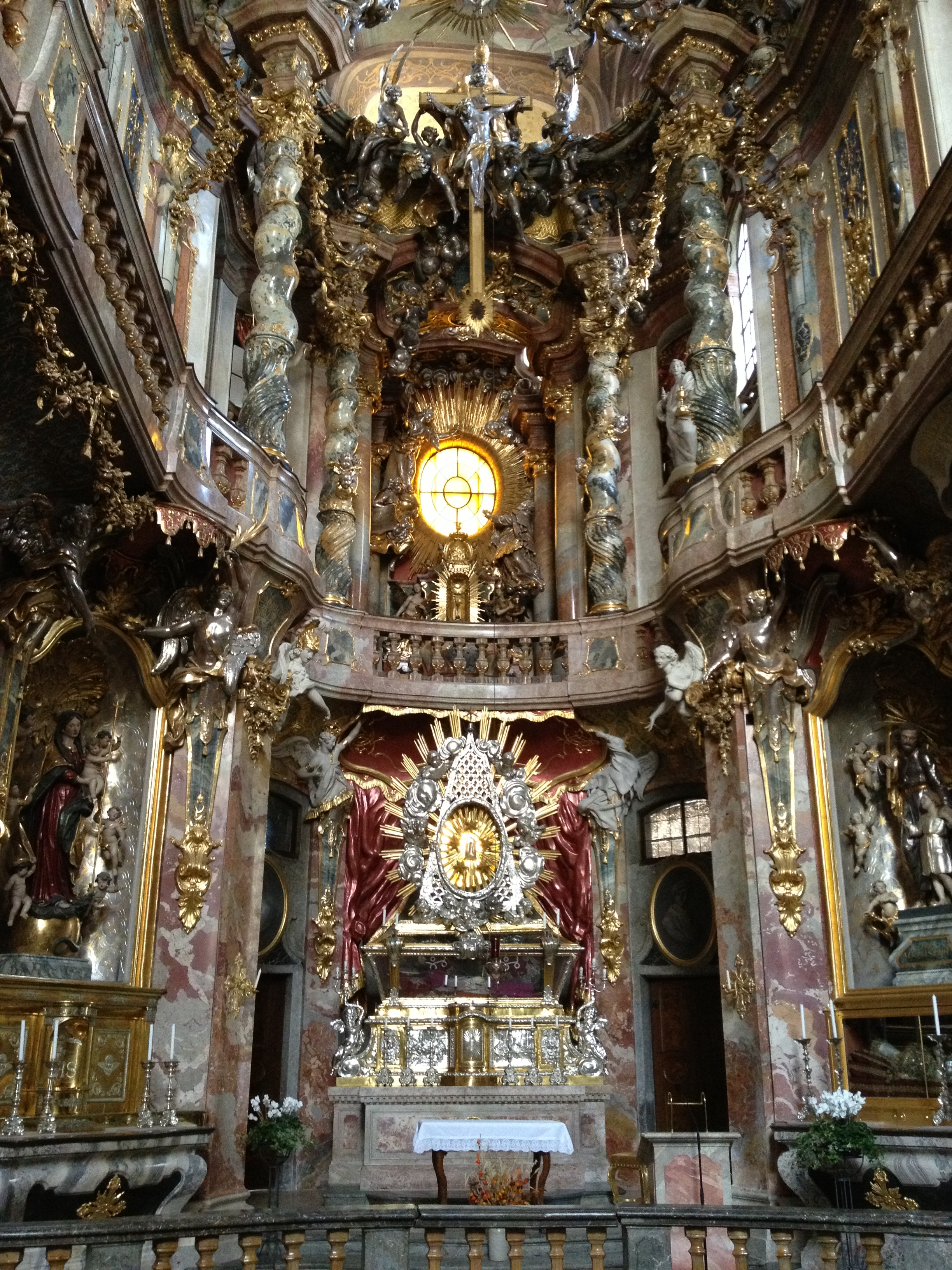 Interior de Asamkirche en Munic